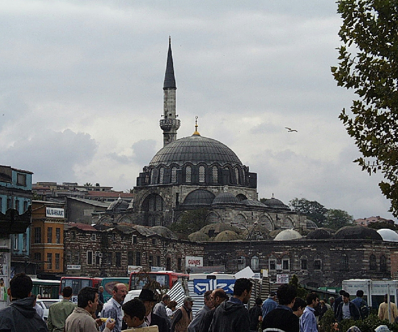 Bilder aus Istanbul